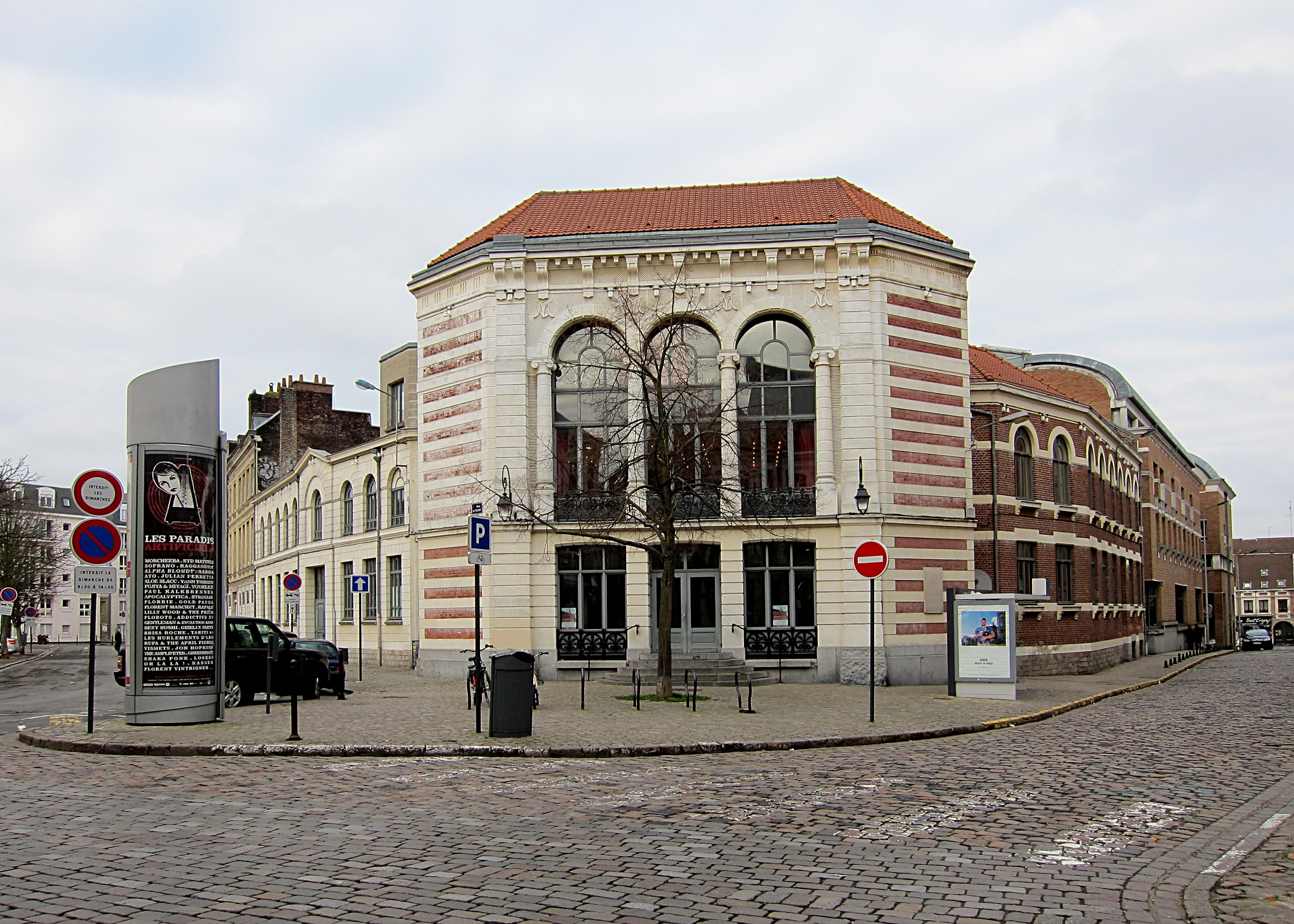 Le Conservatoire National de Région de Lille, ancienne Académie de musique de Lille créée en 1803.